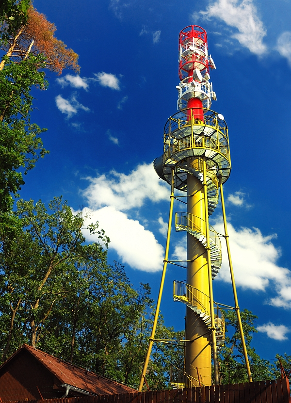 Rozhledna Lhotka u Berouna